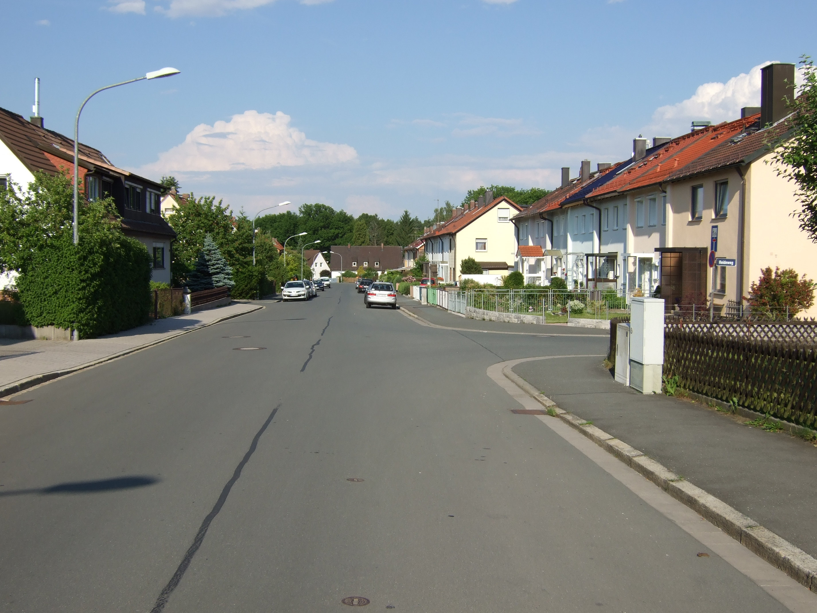 Südlicher Ringweg, Saas, Bayreuth